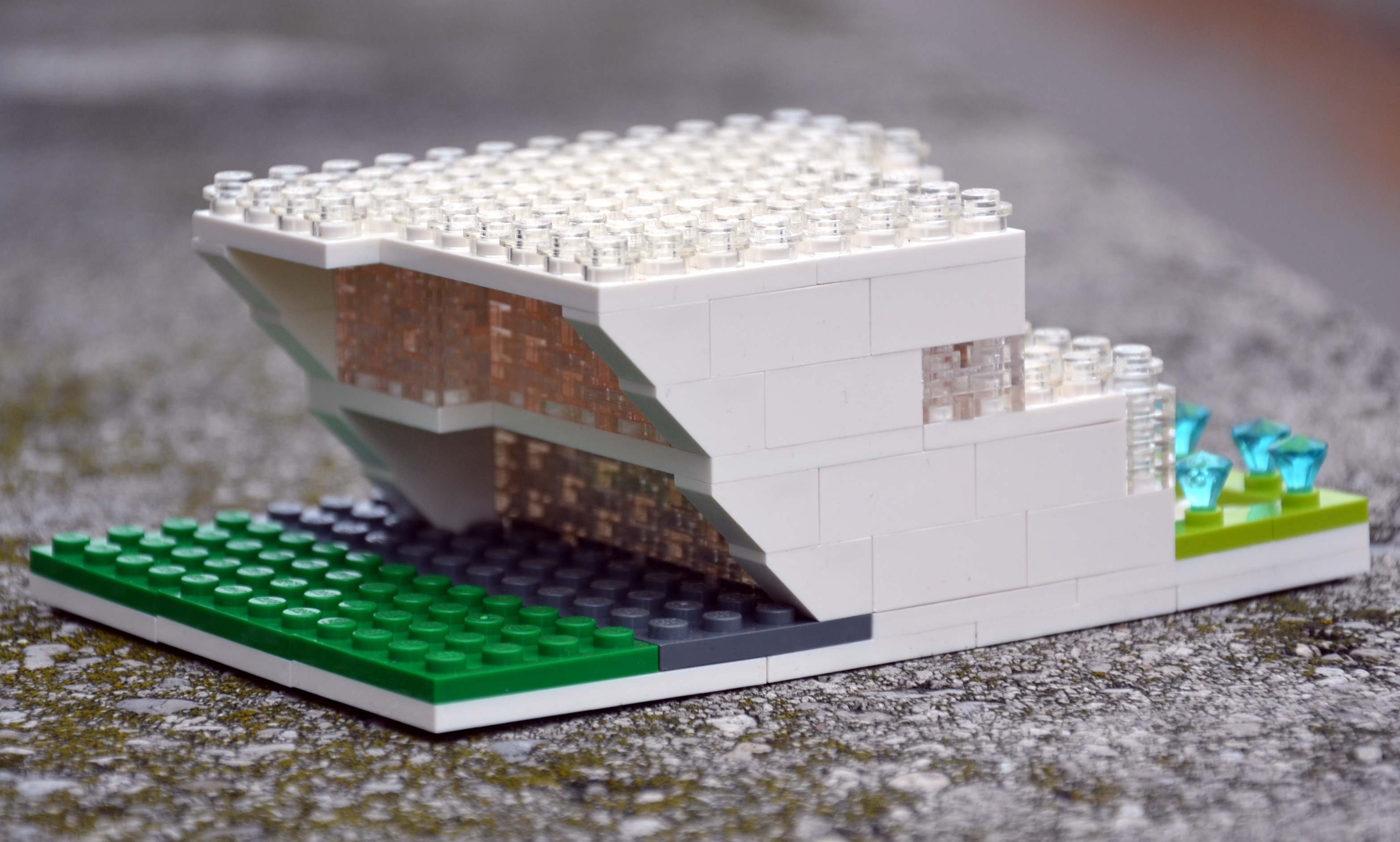 Architektonischer Entwurf eines Gebäudes in LEGO von Designer Oberhammer